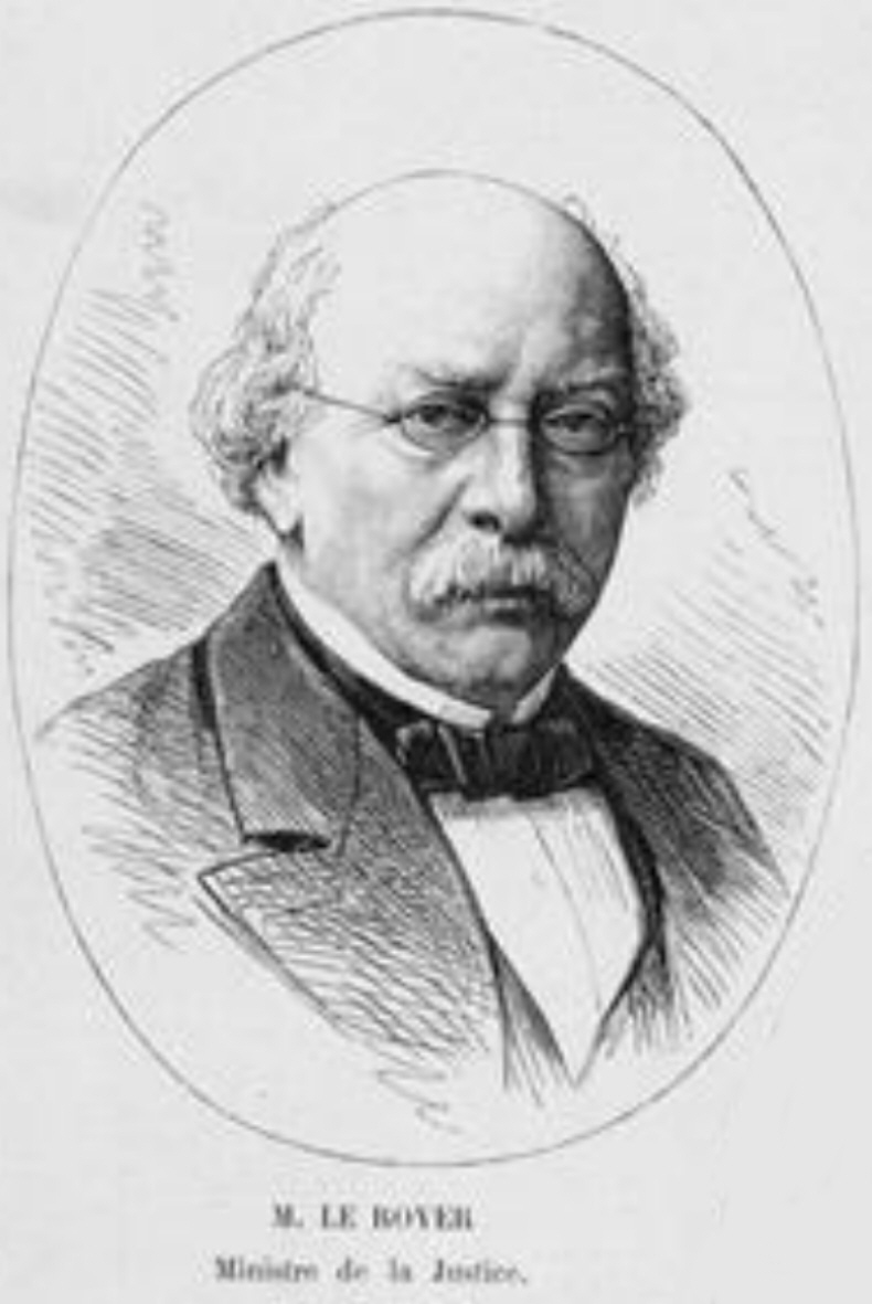 Philippe Le Royer (* 27. Juni 1816 in Genf; † 22. Februar 1897 in Paris), französischer Politiker